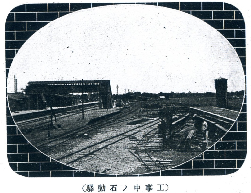 加越鉄道石動駅